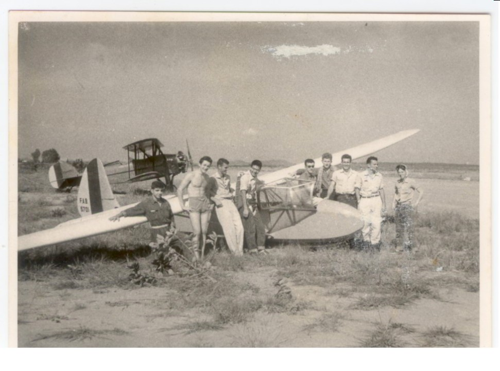 Guido Pessotti, terceiro da direita para esquerda. No campo de vôo de São José dos Campos, CTA em 1957. Primordios da fundação do CVV-CTA. Planador Neivão e rebocador Waco, amobos da FAB. Francisco Leme Galvão é o primeiro da esquerda